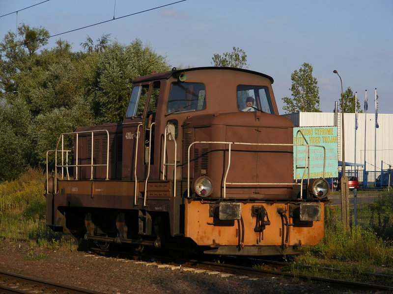 Spalinowa lokomotywa manewrowa 401Da-427 należąca do Instytutu Pojazdów Szynowych „Tabor” stoi na terenie stacji Poznań Wschód i oczekuje na testowaną lokomotywę 380 020-8.